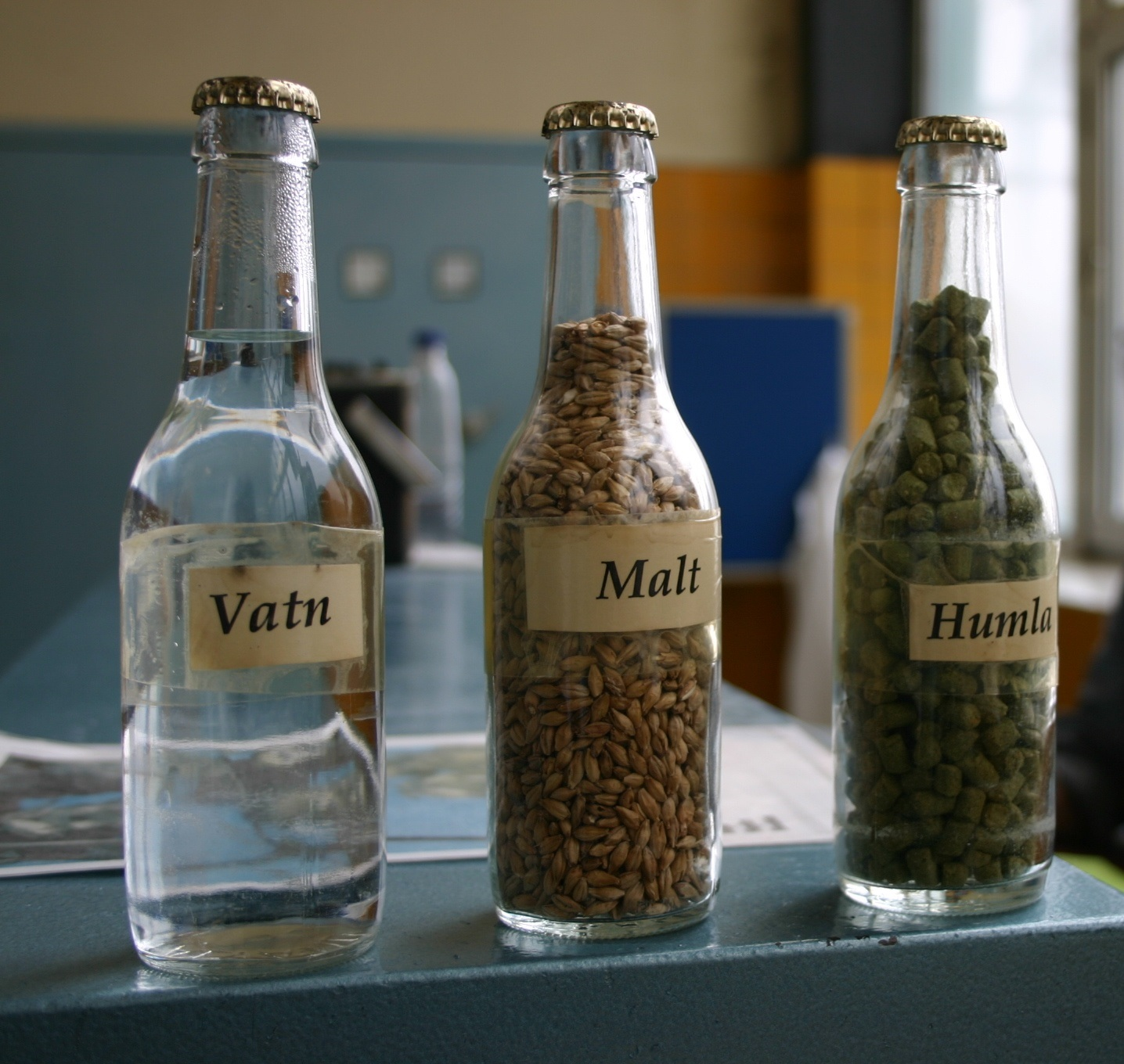 Föroya Bjór, Faroe Islands: Water, malt and hop